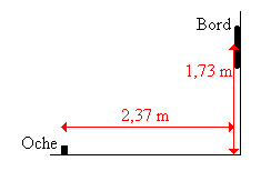 Dartbaan